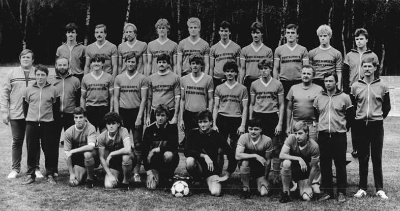 ADN-ZB-Hiekel-28.7.86-St.-Bez. Dresden: Vorbereitung Fußball-Oberliga - Saison 1986-87. Die Mannschaft von Fortschritt Bischofswerda erreichte erstmals den Aufstieg in die höchste Fußballklasse der DDR. Obere Reihe v.l.: Mario Kaiser, Jörg Bär, Wieland Wünsche, Fred Bank, Karsten Petersohn, Heiko Thiel, Roey Schiemann, Steffen Schmidt, Tino Käppler, Thomas Stange. Mitte v.l.: Verantwortlicher Trainer Horst Rau, Trainer Harald Fischer, Physiotherapeut Siegfried Bansch, Gerrit Beckert, Andreas Grämlich, Oliver Merkel, Andreas Hain, Frank Hilzky, Timo Gnauck, Sektionsleiter Manfred Voigt, Mannschaftsleiter STeffen Oehme, Mannschaftsarzt Dr. Hans-Jürgen Knolll. Knieend v.l.: Falk Kunze, Klaus Wange, Jörg Klimpel, Fred Siebert, Tino Gottlöber, Mario Kleditsch.